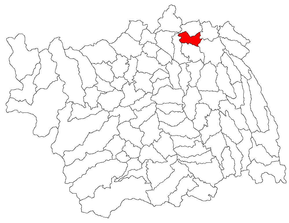 Categorie:Hărţi ale judeţului Bacău